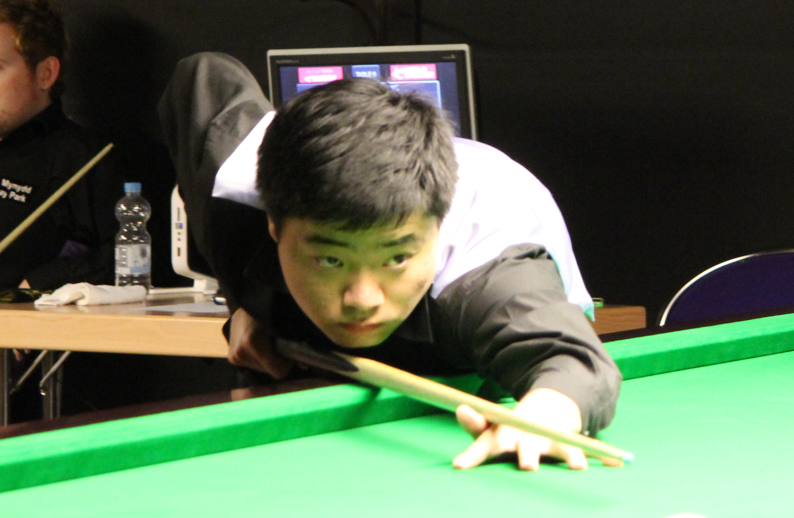 Ding Junhui beim Paul Hunter Classic 2011